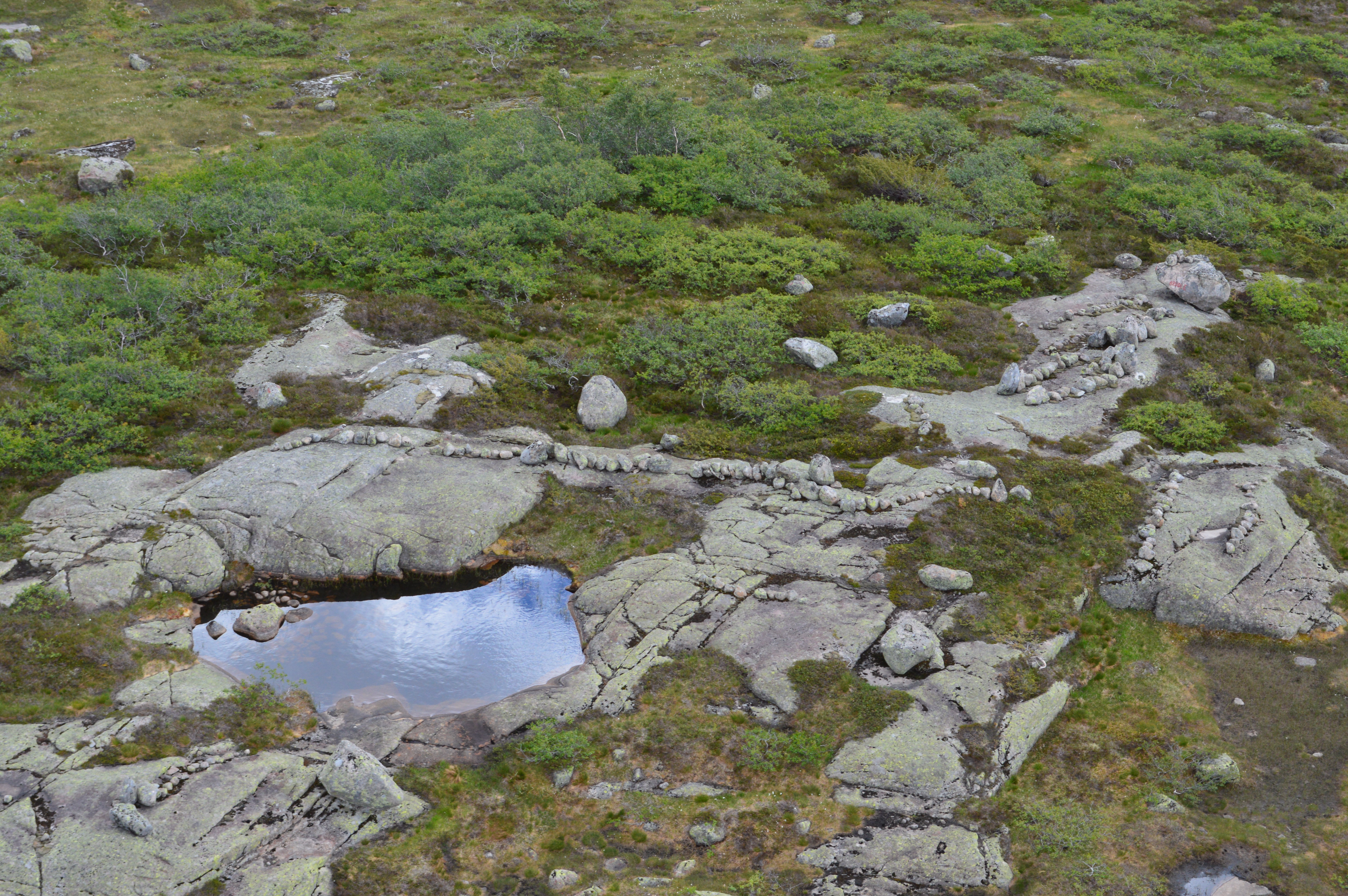 Steinformasjoner på Sirdalsheia, kalt Brudler